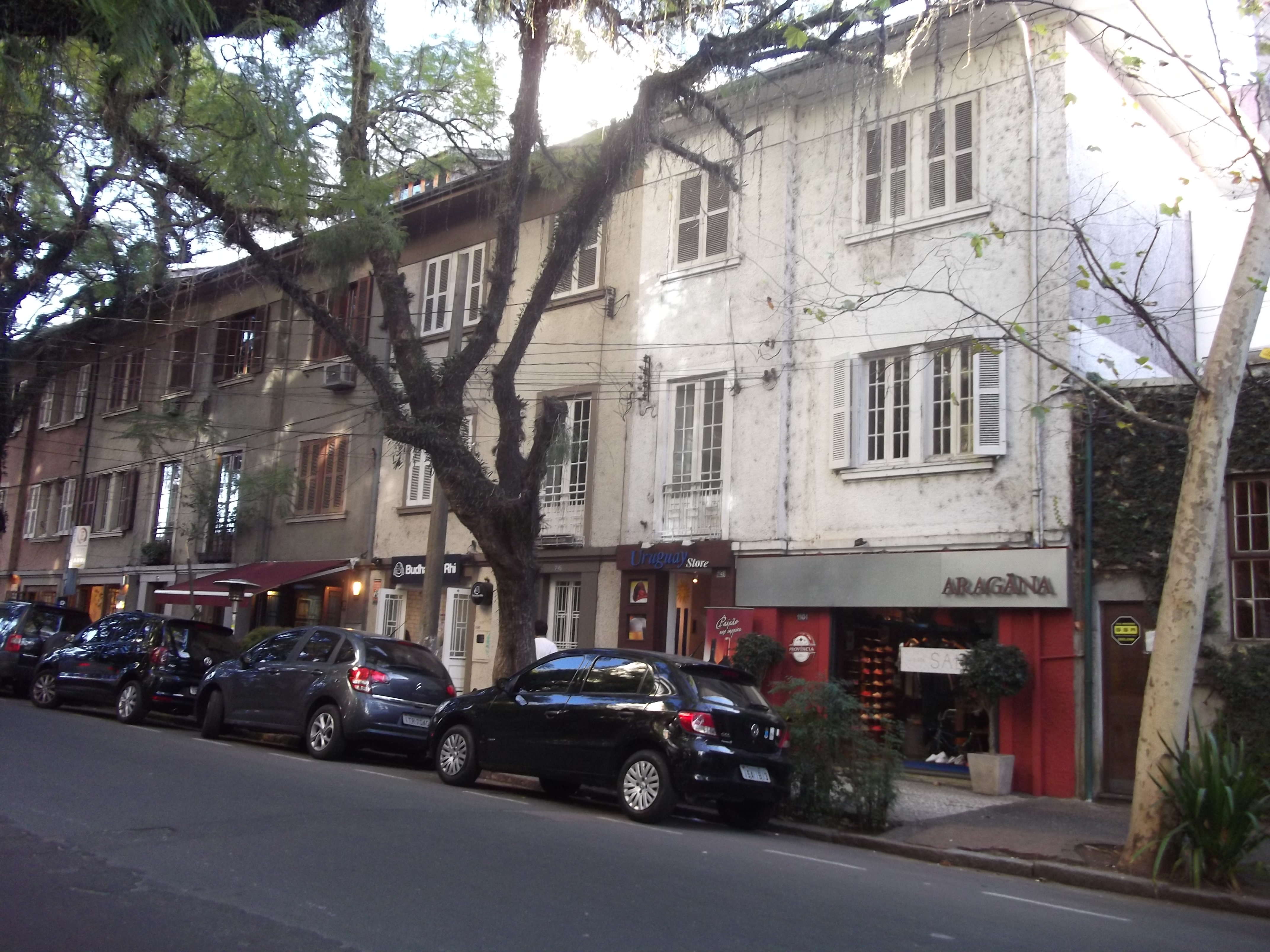 Casario à Rua Félix da Cunha, Porto Alegre, Brasil